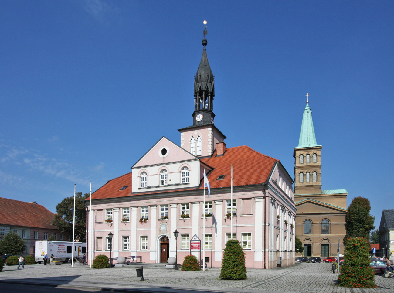 Międzyrzecz, ratusz, mur., 1813